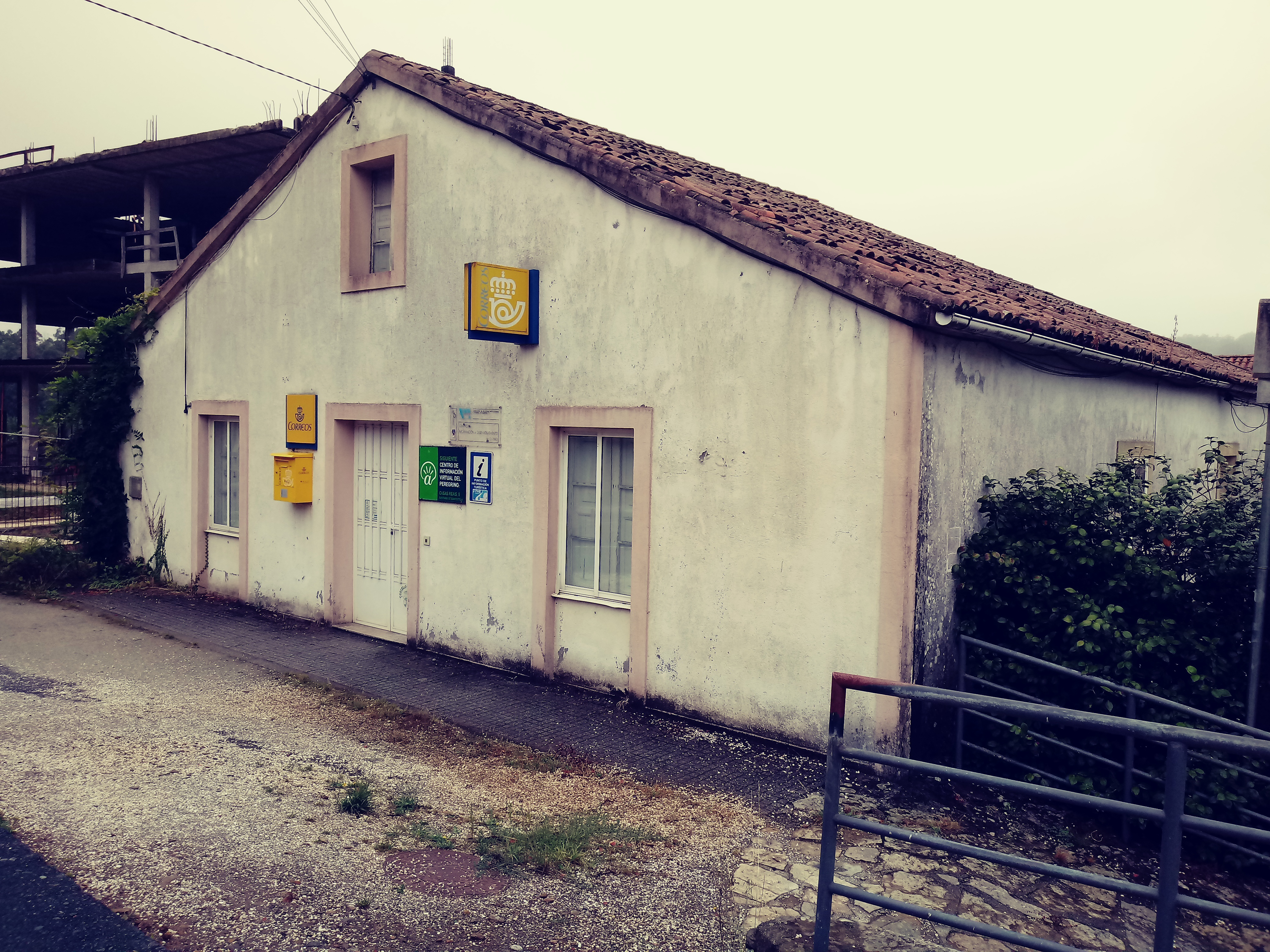 Solar da familia de Luís Seoane no que residiu o intelectual galego, a casa anterior foi derrubada para albergar brevemente as dependencias municipais, antes do seu traslado á actual casa do concello no Pedrouzo. Actualmente é oficina de Correos, oficina de turismo durante o verán e alberga algunha dependencia municipal máis.